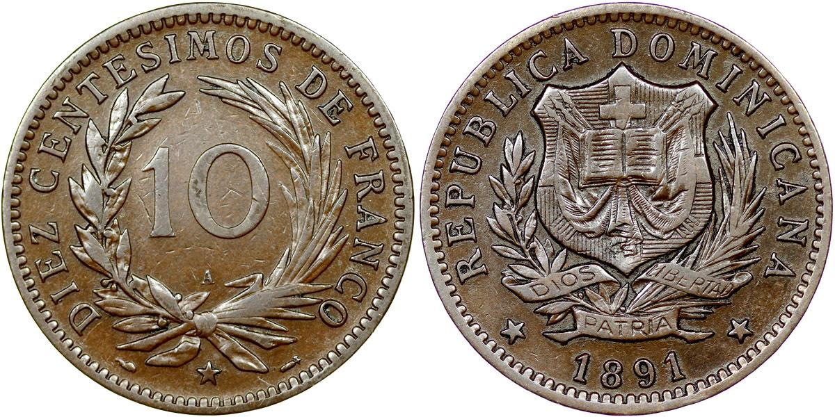 Moneda de 10 centésimos de franco dominicano